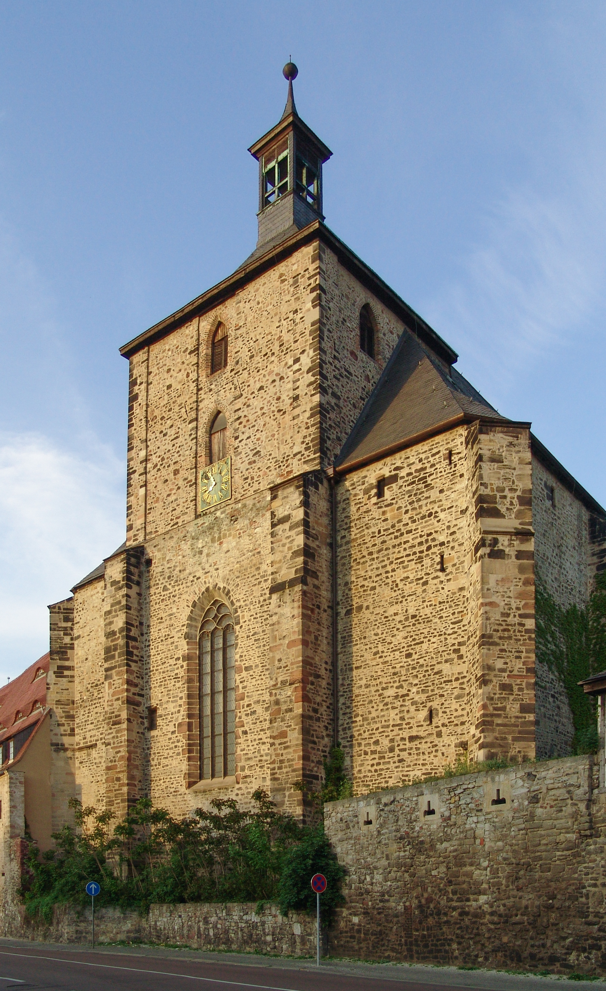 Moritzkirche